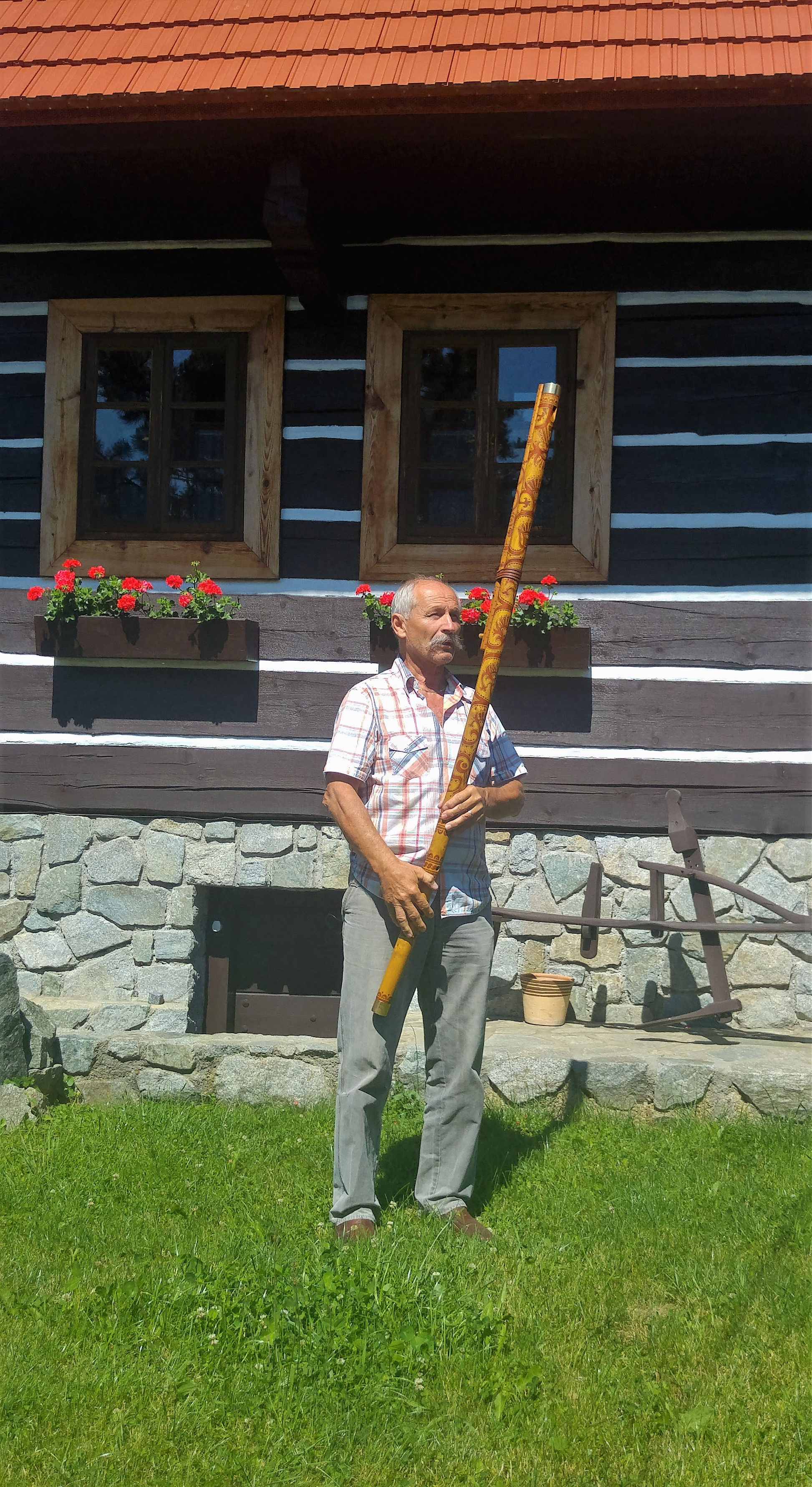 Ľubomír Párička twórca tradycyjnych fujar i gajd